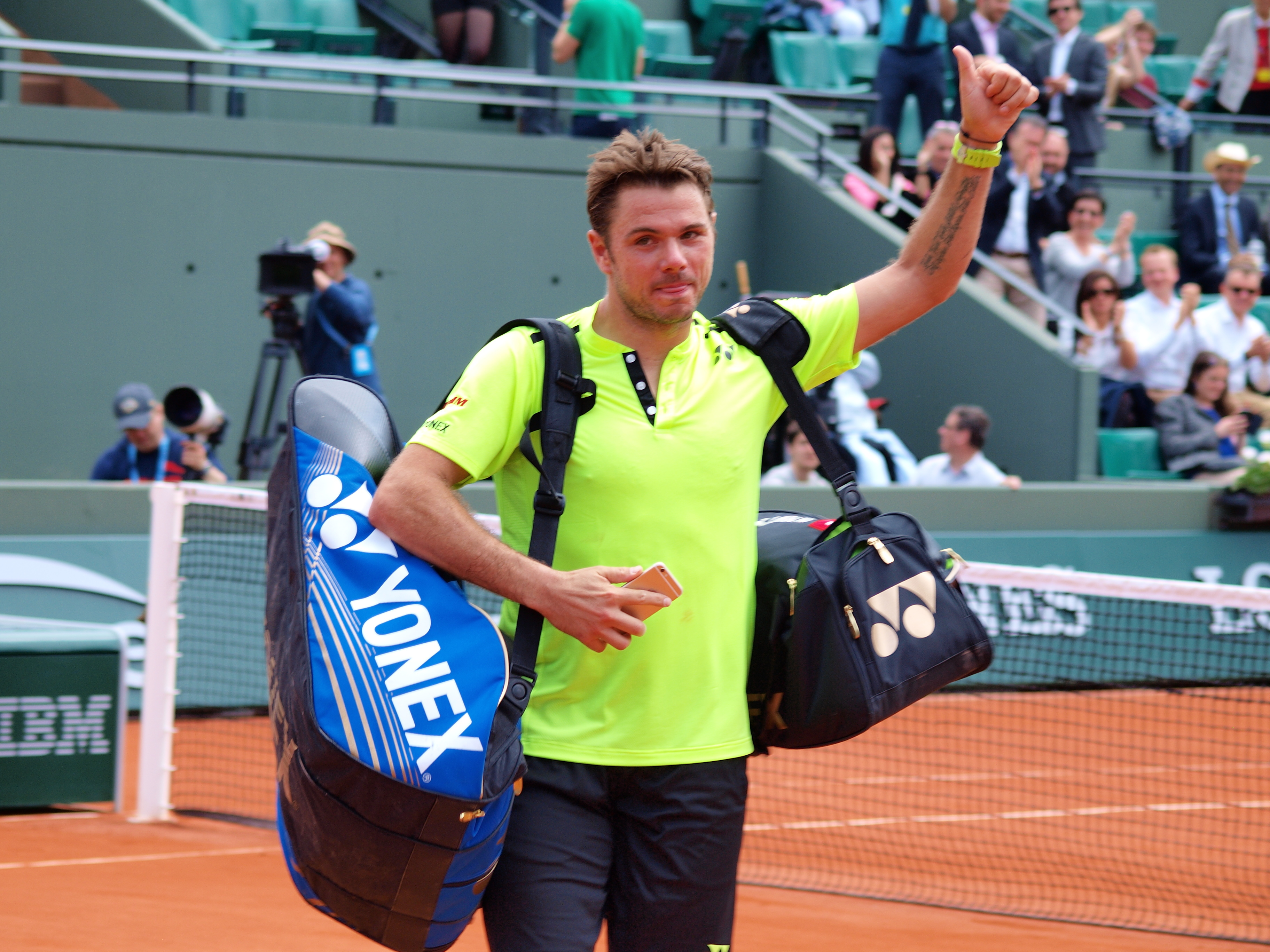 Le joueur de tennis helvète Stanislas Wawrinka, lors des internationaux de France de tennis , sur le stade Roland Garros, à Paris, le 25 mai 2016, dans son duel sportif contre le joueur nippon Taro Daniel.